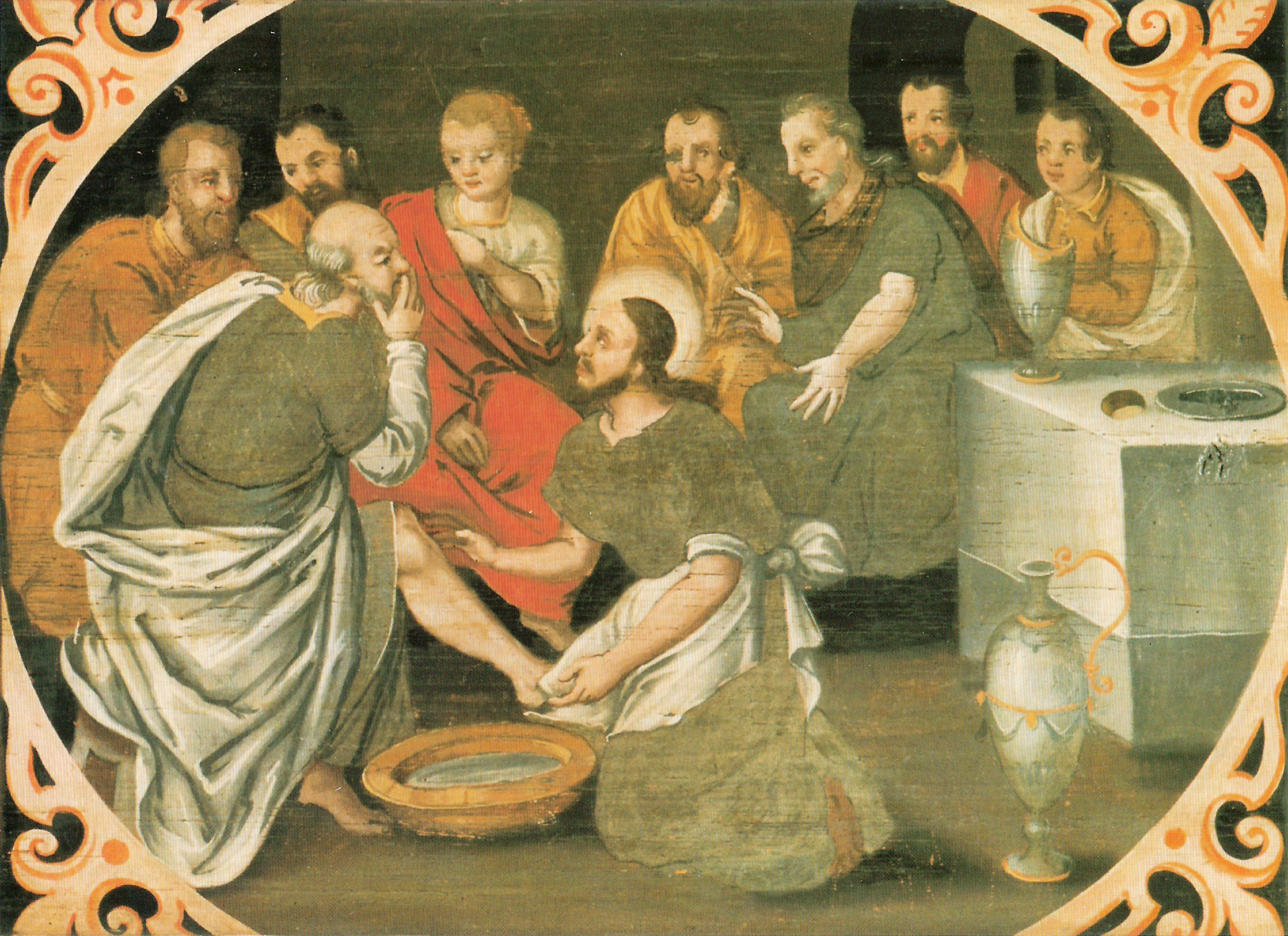 Fußwaschung